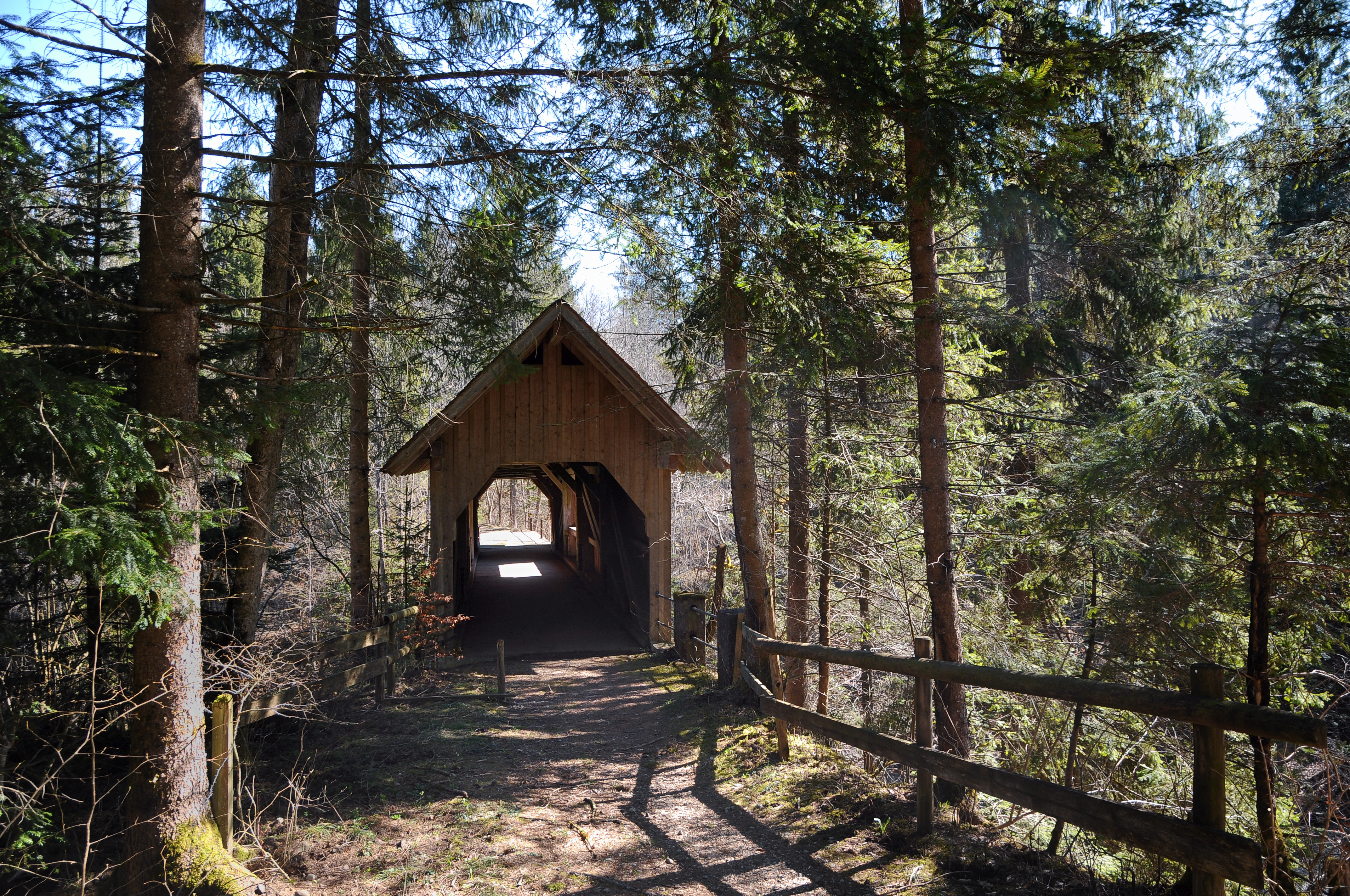 Giessenbrücke in Krumbach (Vorarlberg). Bezeichnet 1790, gedeckte Holzbrücke mit mehrfachem Hängewerk. Sie steht unter Denkmalschutz.